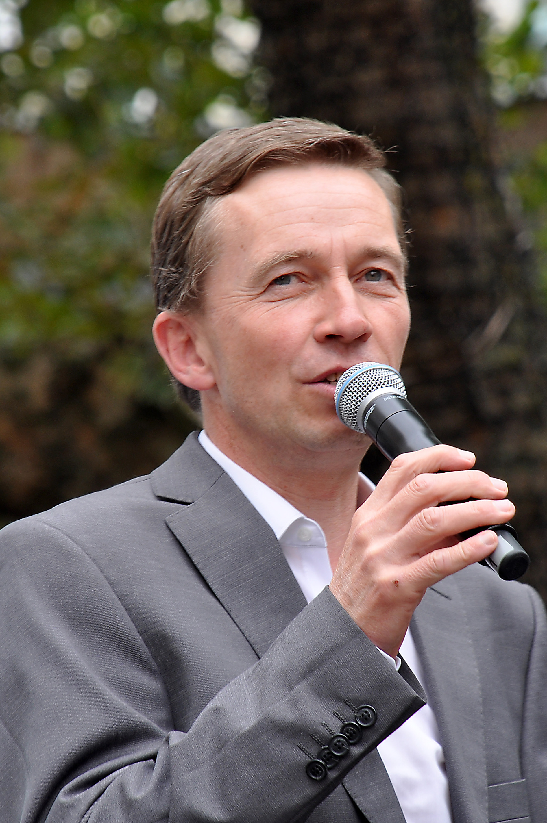 Prof. Bernd Lucke, Sprecher der Alternative für Deutschland (AfD) bei einer Wahlveranstaltung am 03.09.2013 in Dortmund.